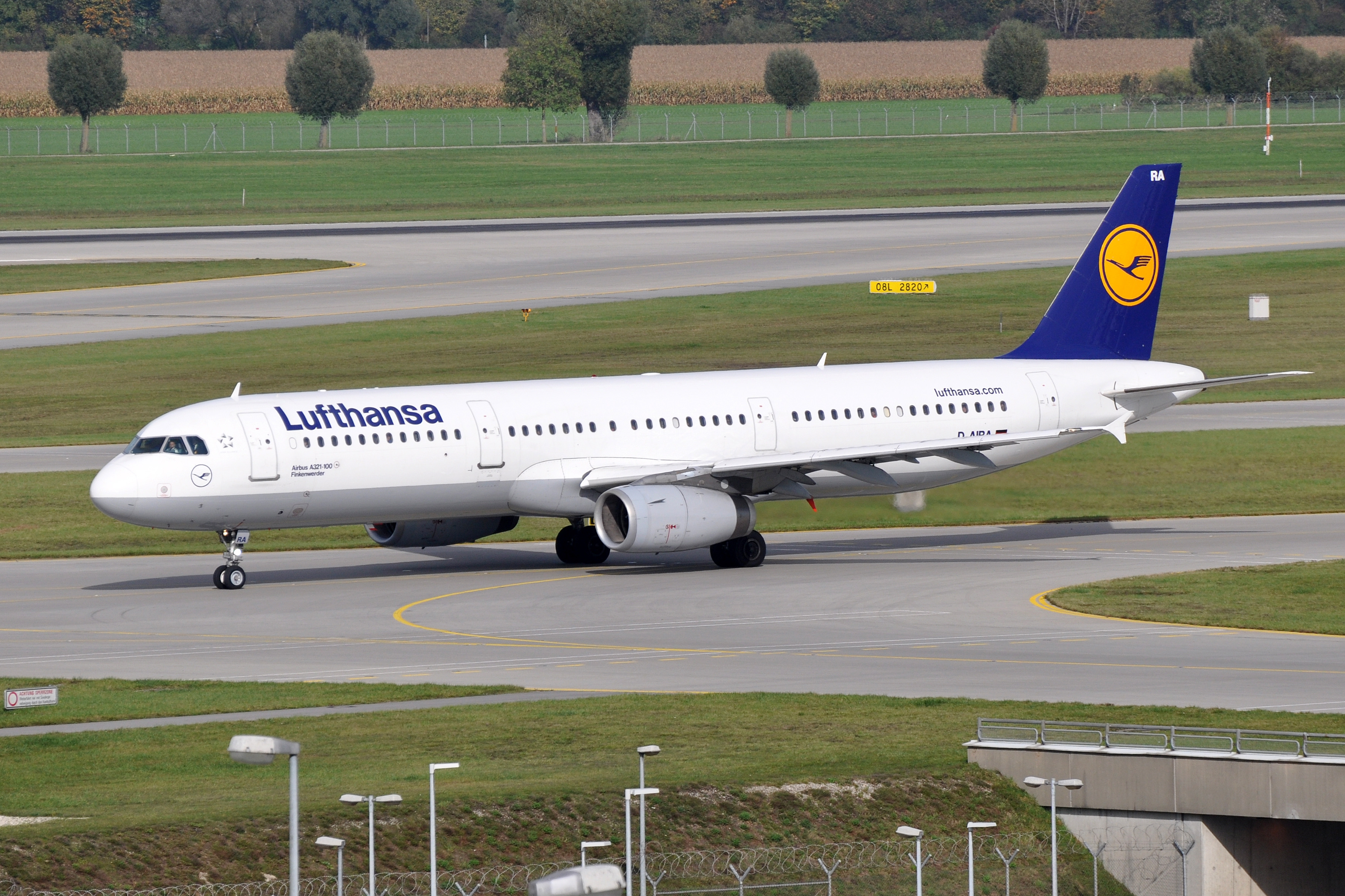 MSN 458 A321-131 LUFTHANSA MUC